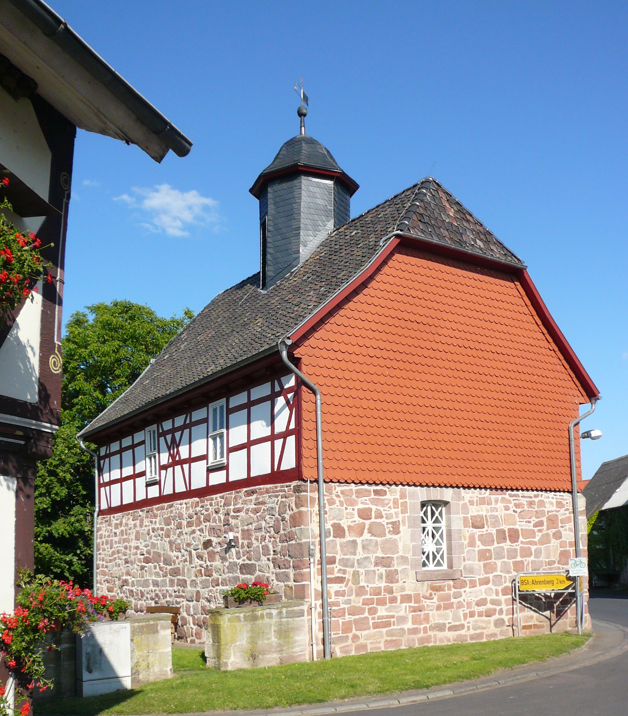 Kirche in Ellershausen, Stadt Bad Sooden-Allendorf, Nordhessen. Erbaut 1590